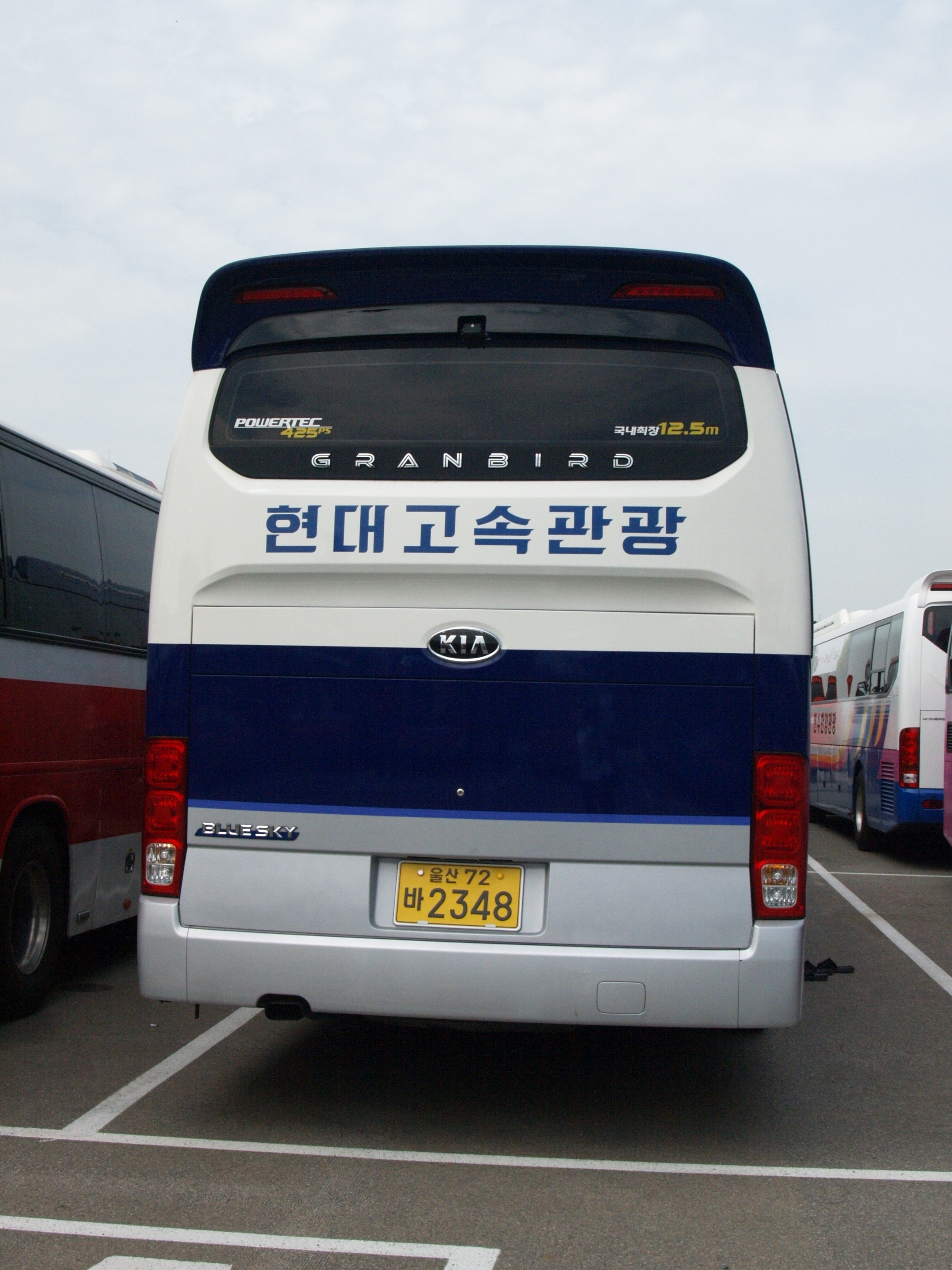 kia bus newgranbird bluesky